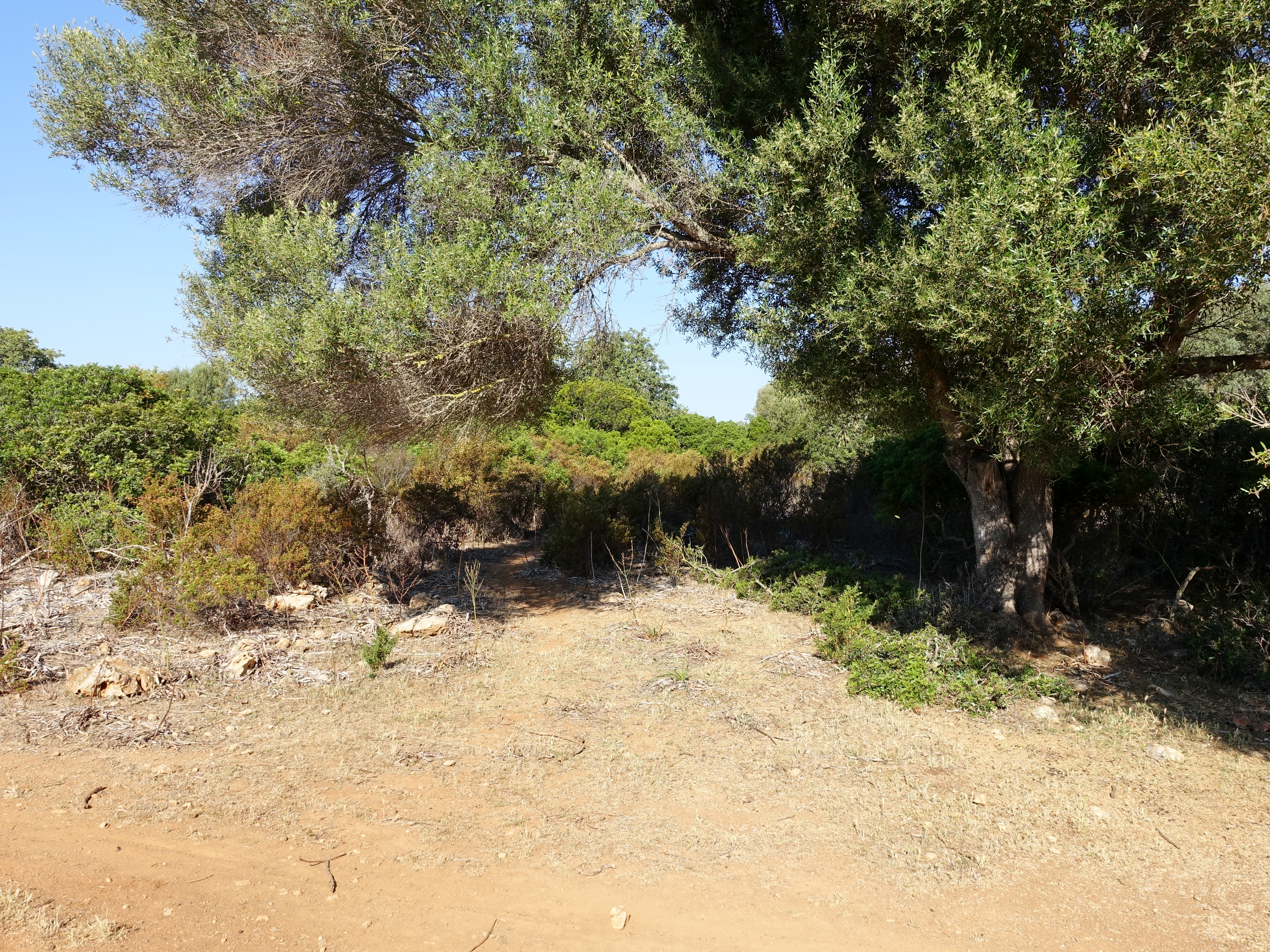 Zugang zur Cova des Pont an der Ostküste von Mallorca, Spanien